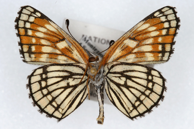 Chlosyne fulvia ventral view